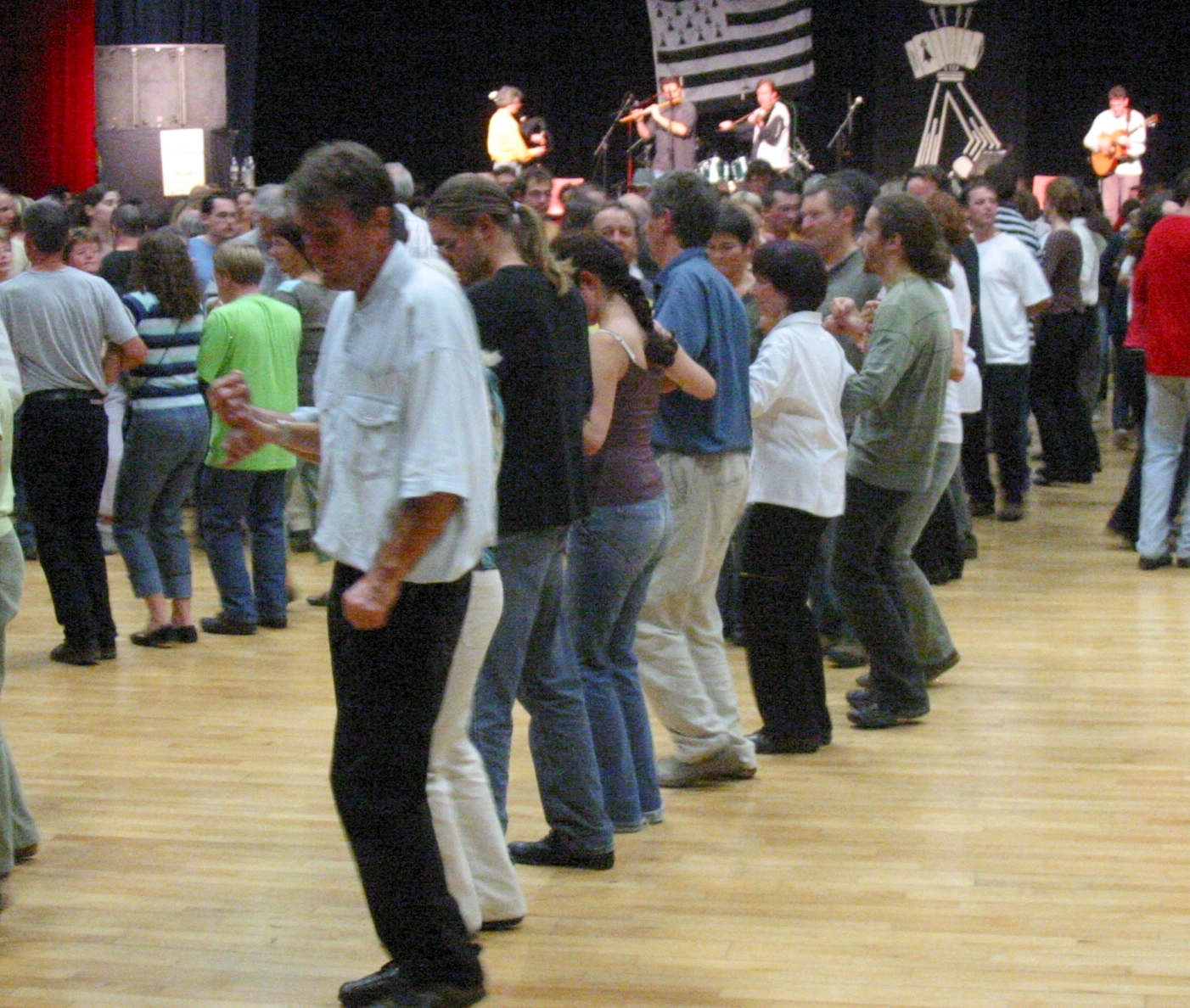 Fest noz à la Fête Mill Góll en Pays Gallo 2007